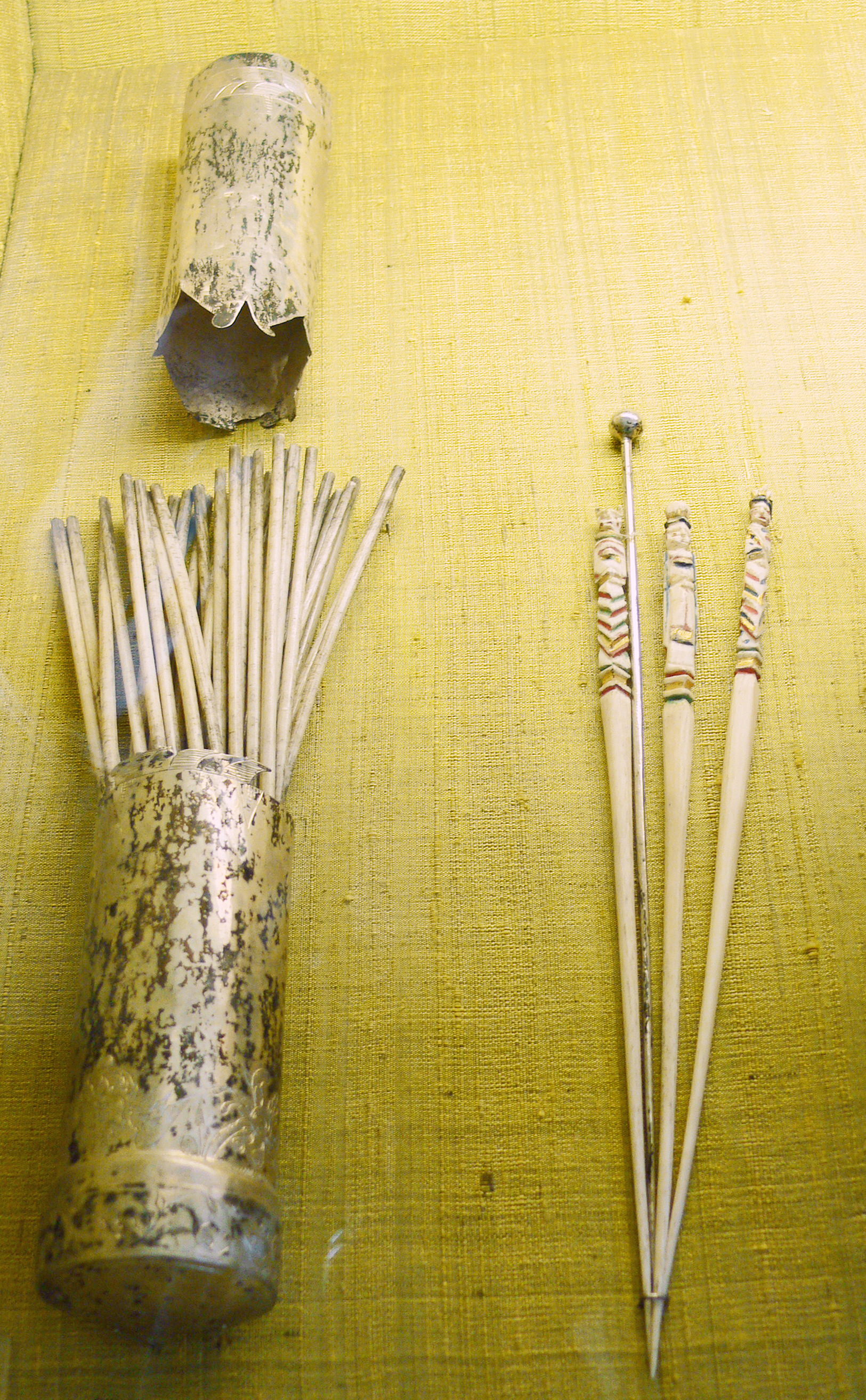 Mikado-Spiel (Bein in Silberhülle), frühes 17. Jh. Vermutlich aus dem Besitz von Eleonore Magdalene Landgräfin zu Hessen (1600-1624), der Ehefrau des Herzogs Ludwig Friedrich von Württemberg Kunstkammer, Württembergisches Landesmuseum Stuttgart